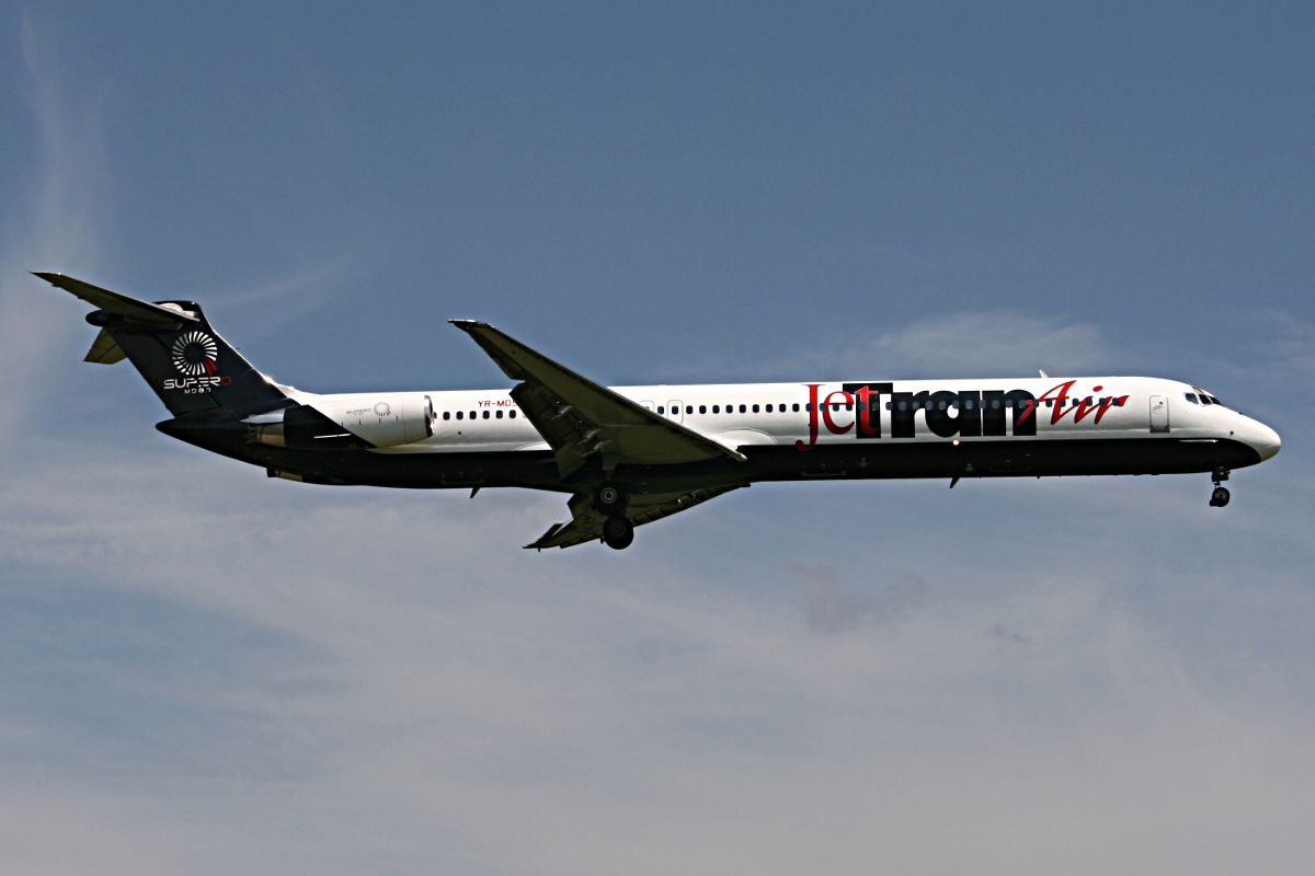 Jetran Air MD-82